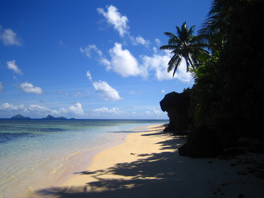 Photo Plage à Mangareva en Polynésie française (Photo personnel 2006) Utilisateur:FRED